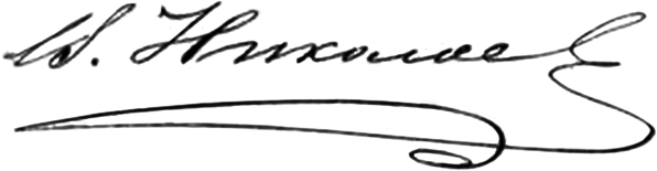 Роспись архитектора Владимира Николаева (1847–1911)